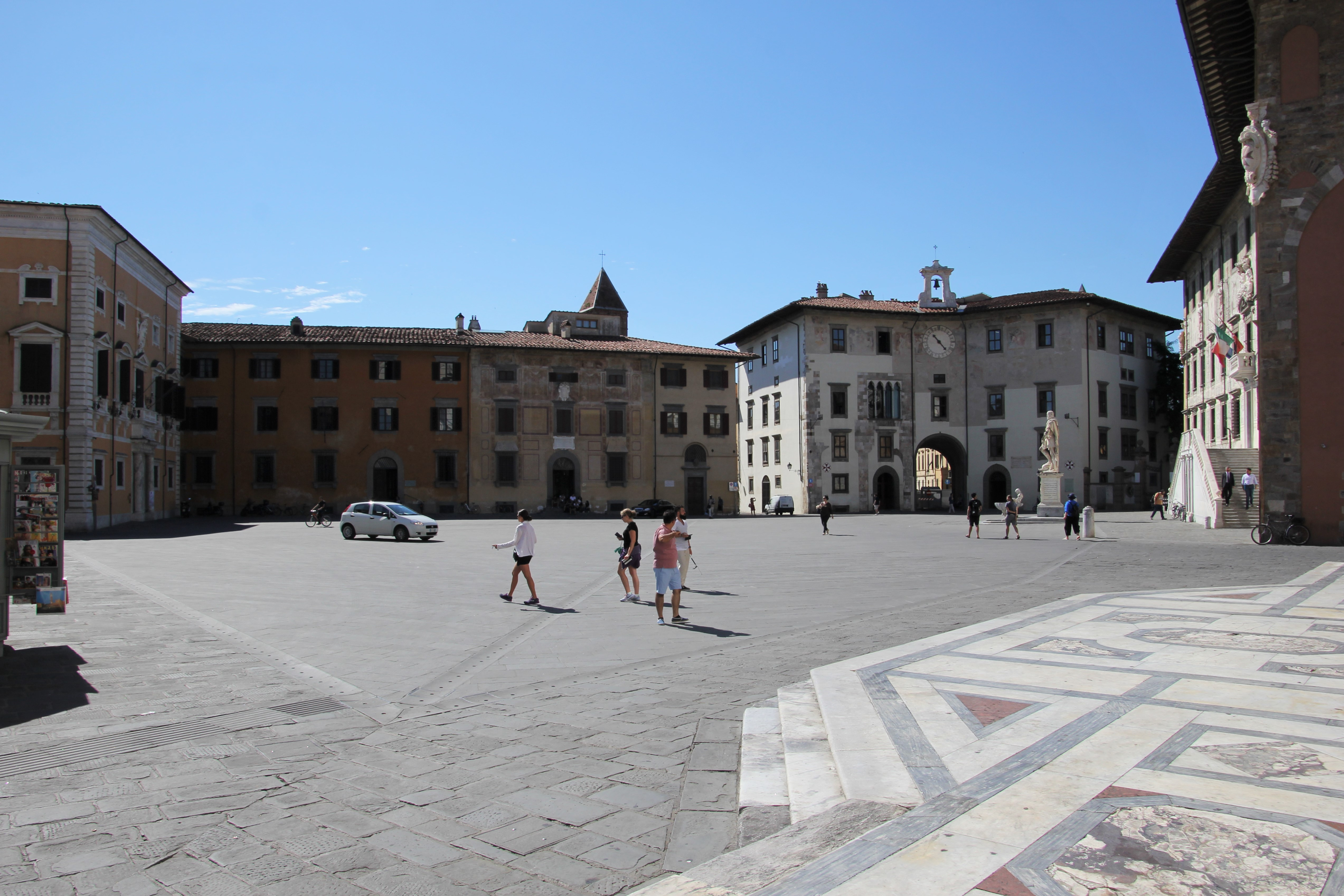 Pisa, piazza dei Cavalieri